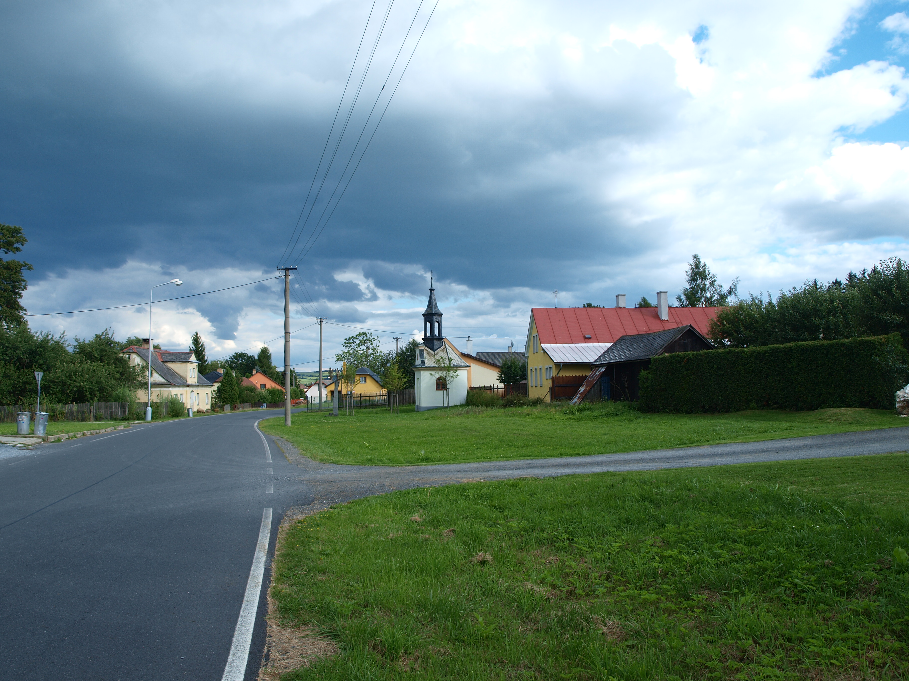 Náves v Edrovicích; pohled ve směru na Rýmařov